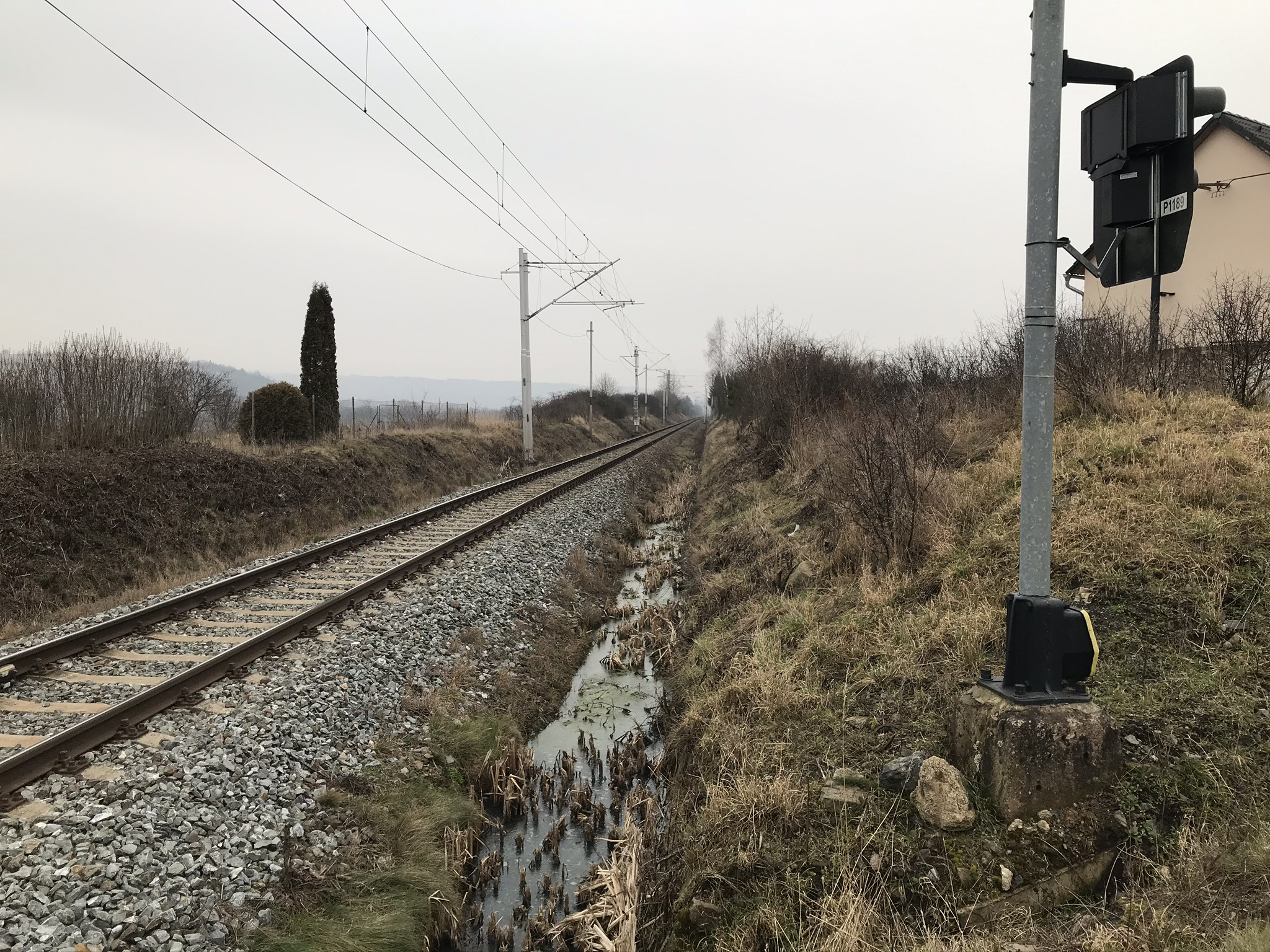 Blovice-Vlčice; místo, kde by se měla nacházet plánovaná železniční zastávka